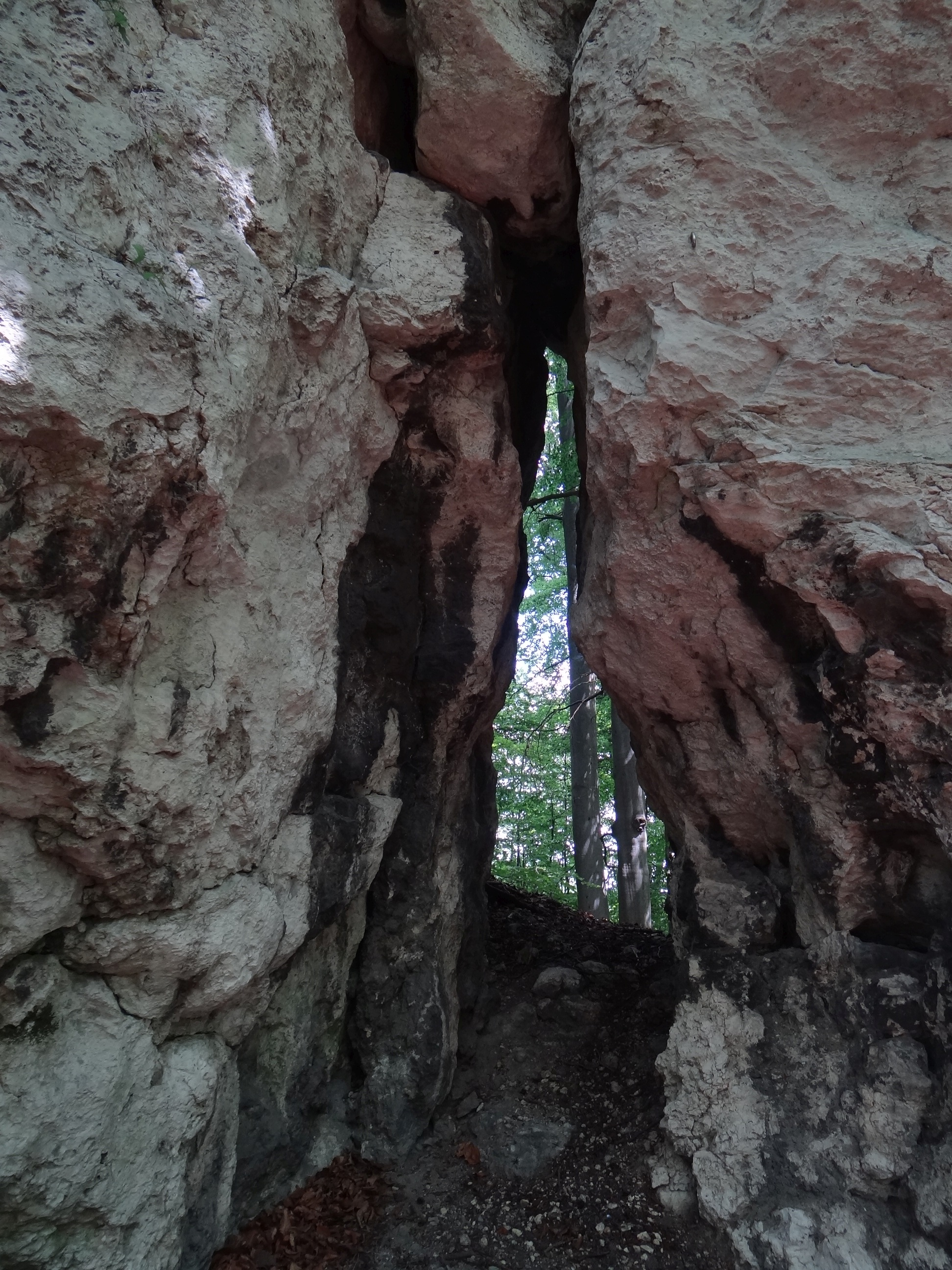 Ostra Bramka z Dziurką obok w skale Maniak Zadni na Maniakówce koło Jaroszowca